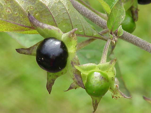 Species: Atropa bella-donna Family: Solanaceae Image No. 1